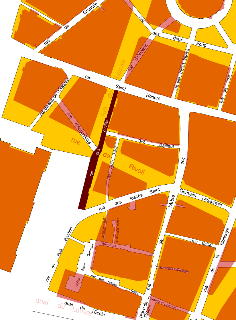 La rue des Poulies à Paris en 1793-1795 (plan des sections, feuille 34) avec, en superposition, le tracé contemporain (2014) des rues